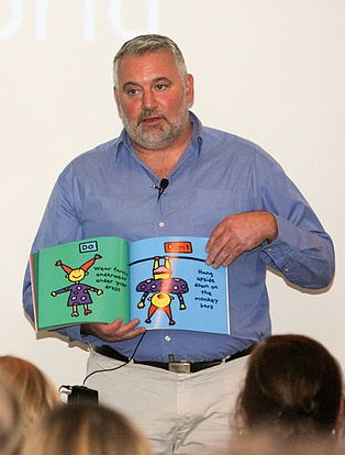 El escritor Todd Parr